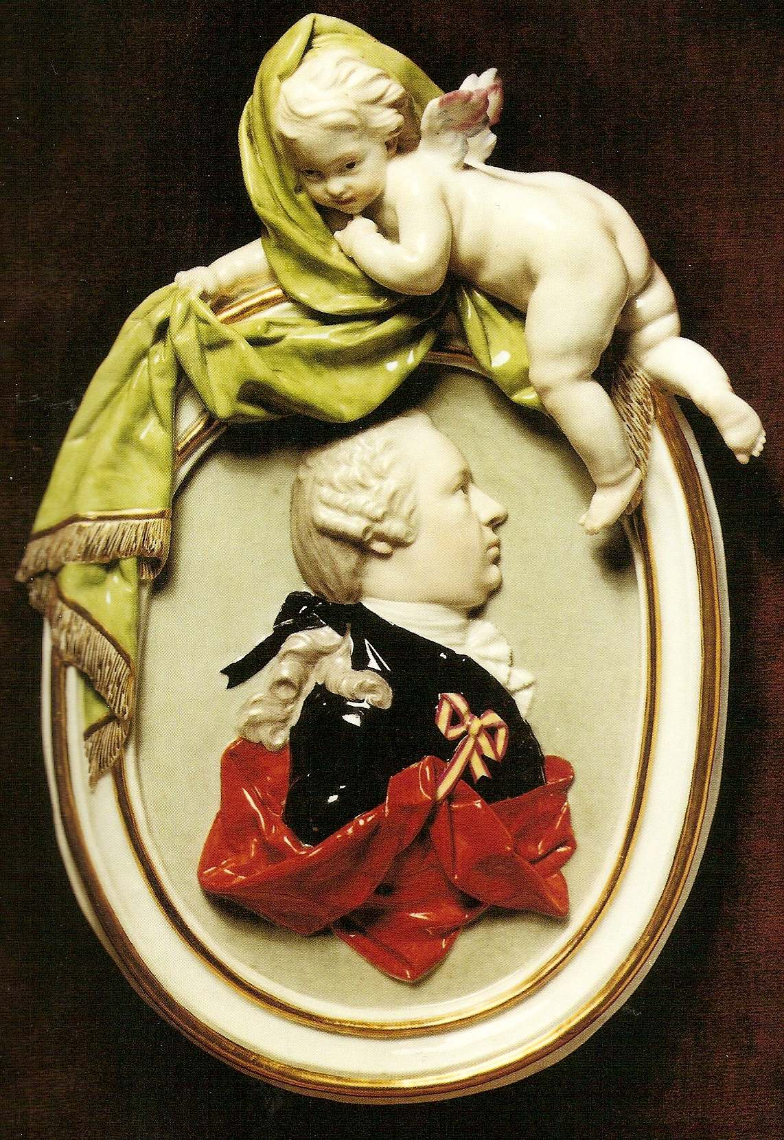 Karl Anselm von Thurn und Taxis (1733-1805), Porzellanarbeit aus der Manufaktur Höchst